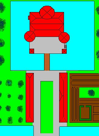 Tekening van een generieke Groninger borg met dubbele gracht en twee schat-of bouwhuizen. Robert Prummel